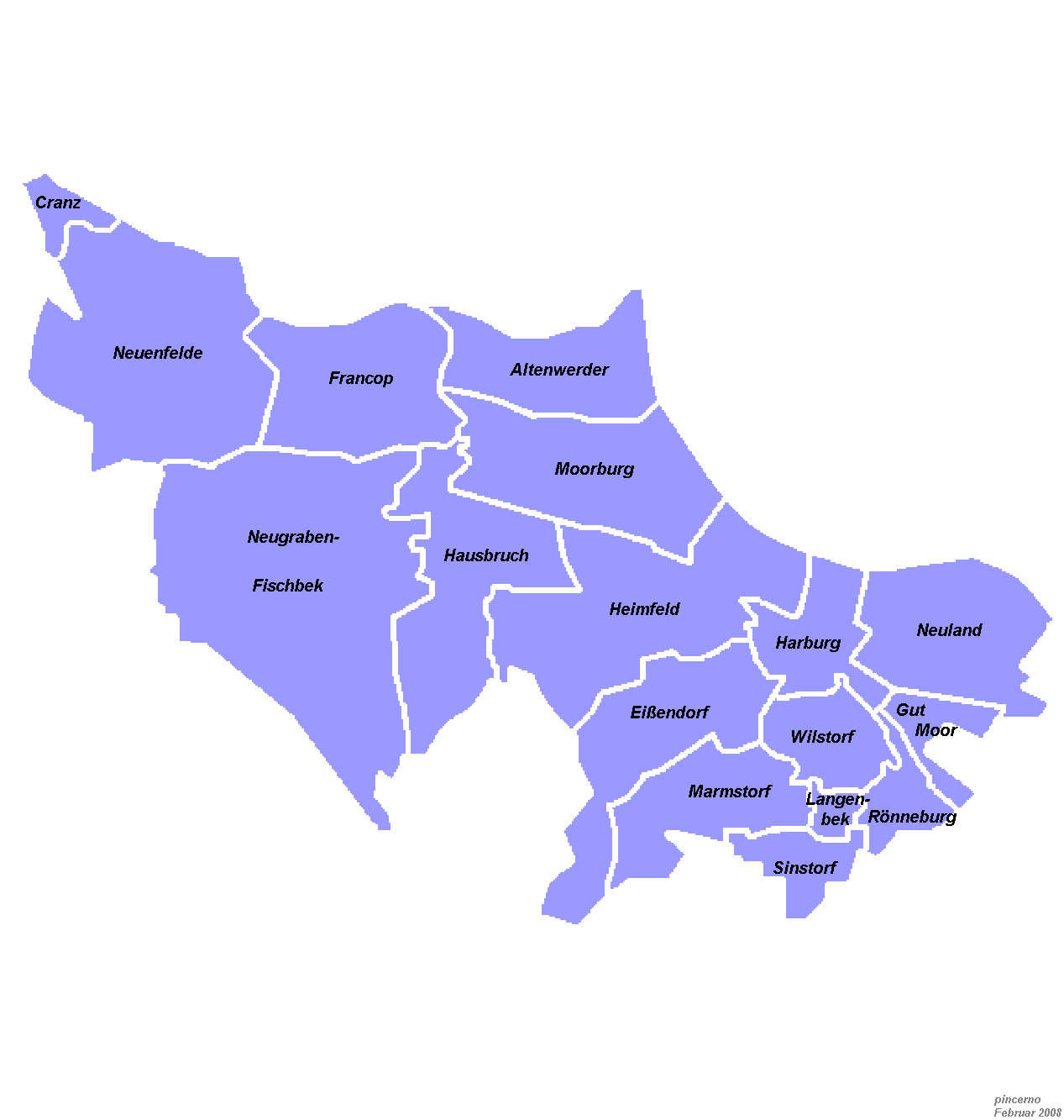 Stadtteile im Bezirk Harburg von Hamburg.